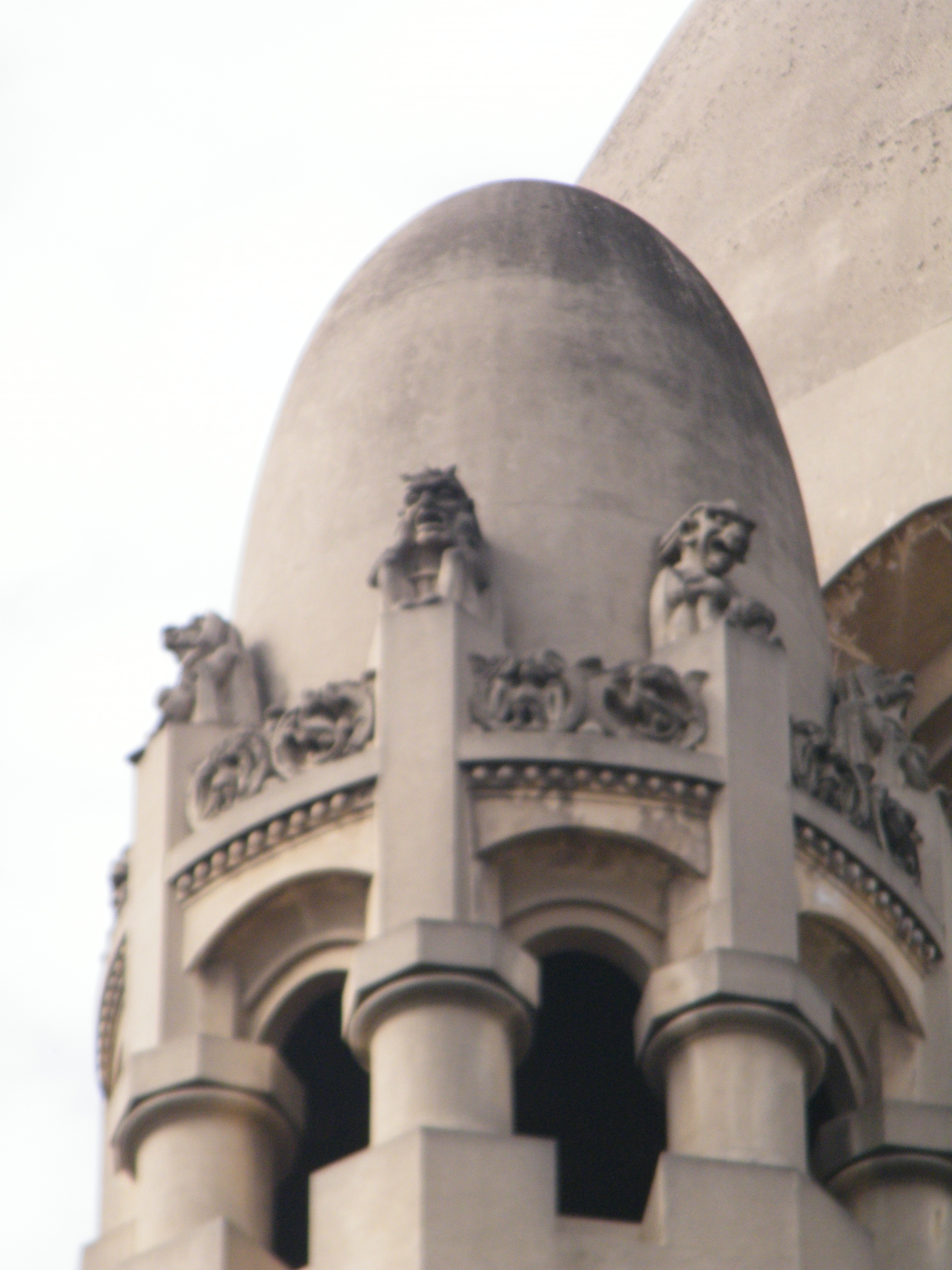 Fotografias del Santuario de Lourdes, incluyen imágenes de la Basílica, Gruta y Convento